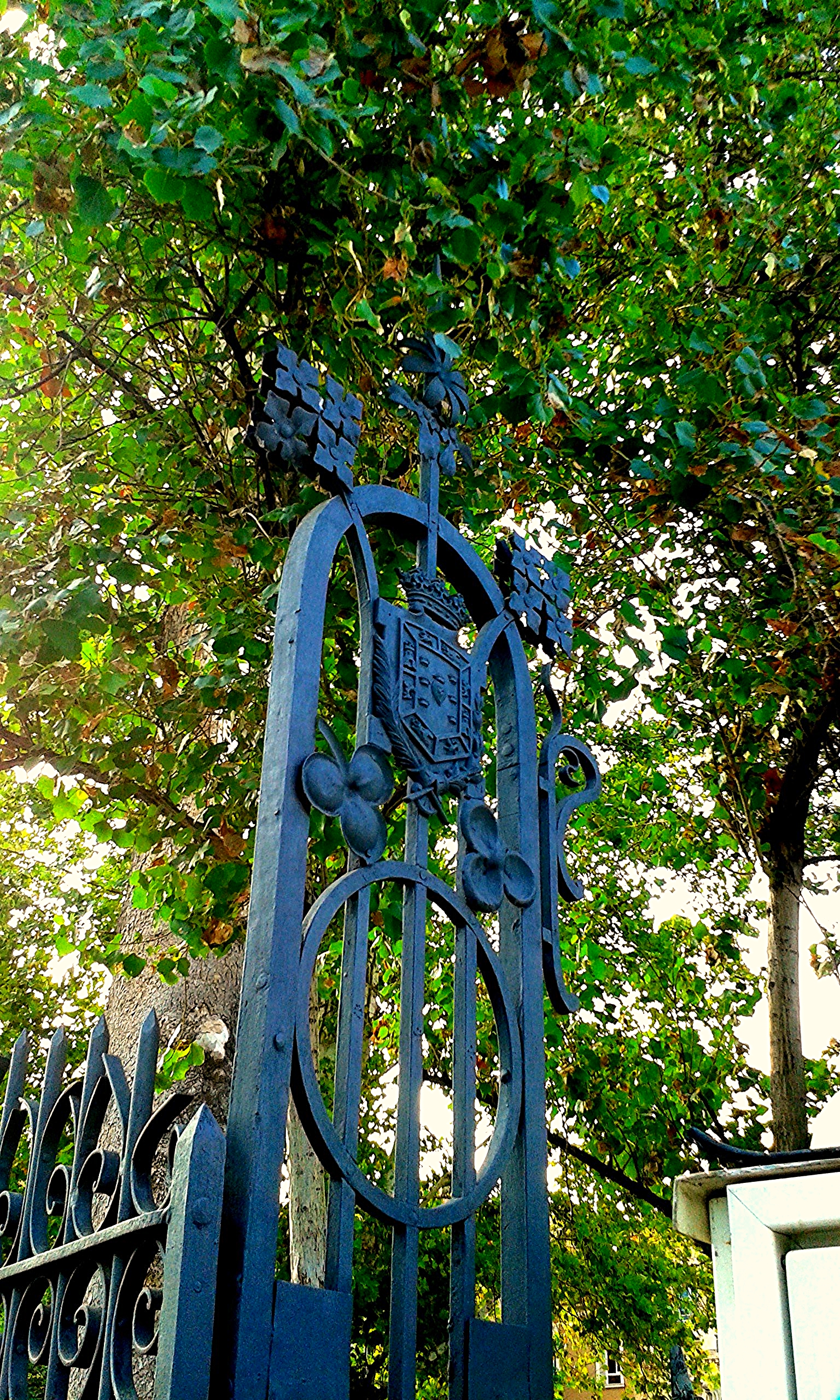 Detalle de la entrada al Jardín de Floridablanca